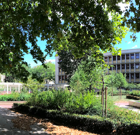 Le Microlycée de Paris est situé dans les locaux de la Cités scolaire François Villon à Paris 14ème.